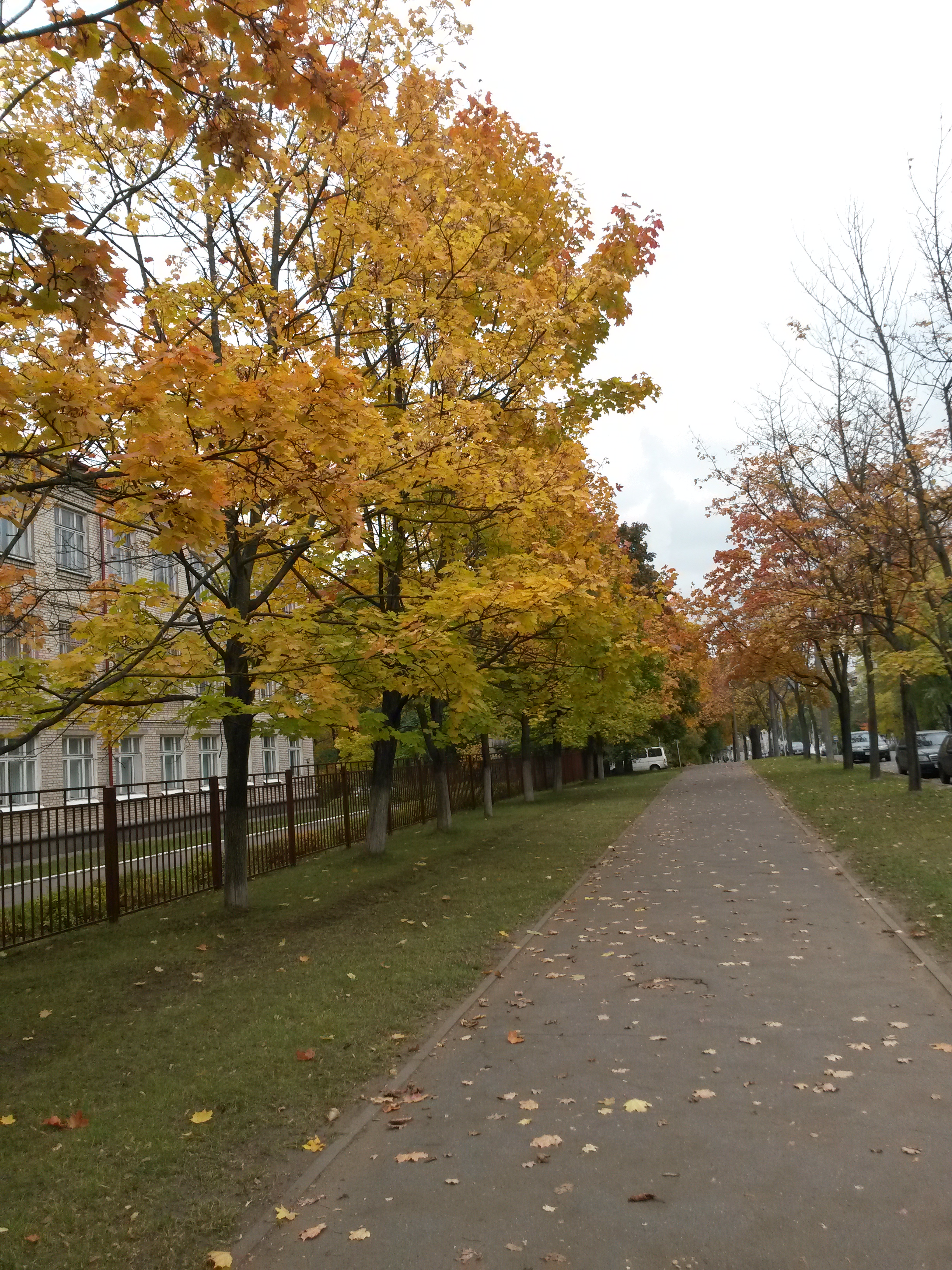 Улица Кнорина в Минске